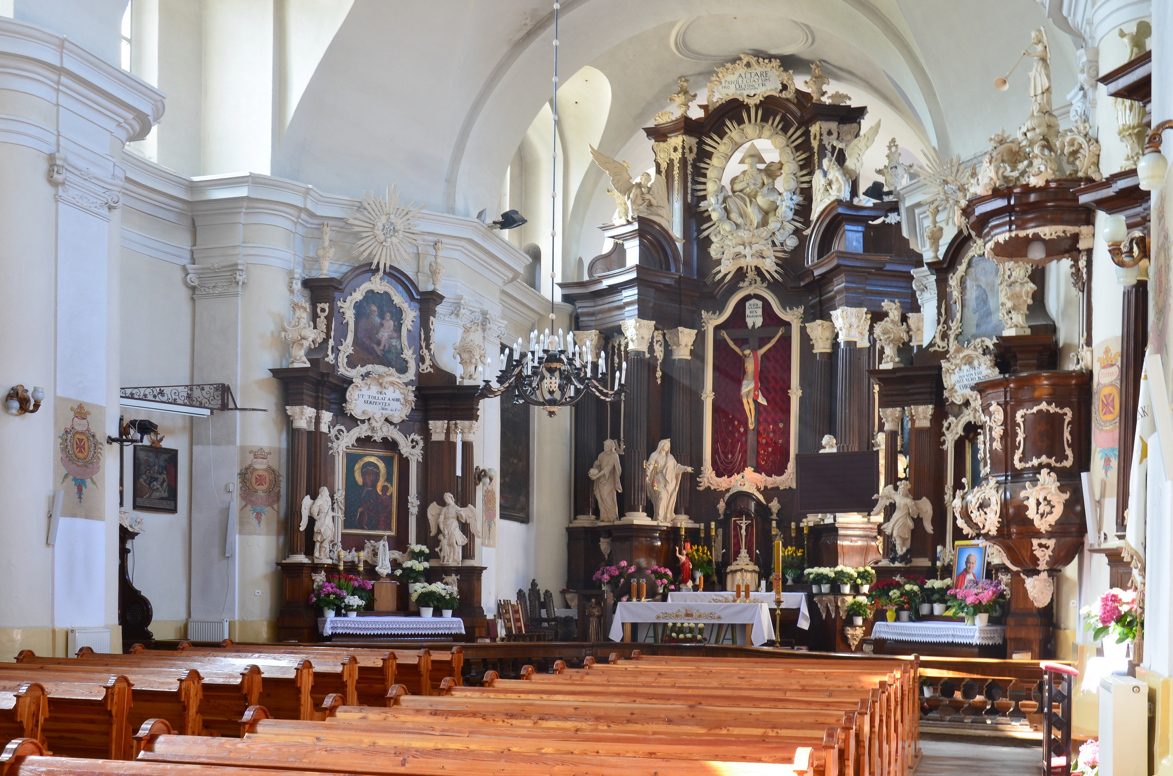 Kościół reformatów pw. Niepokalanego Poczęcia NMP, 1751-1761